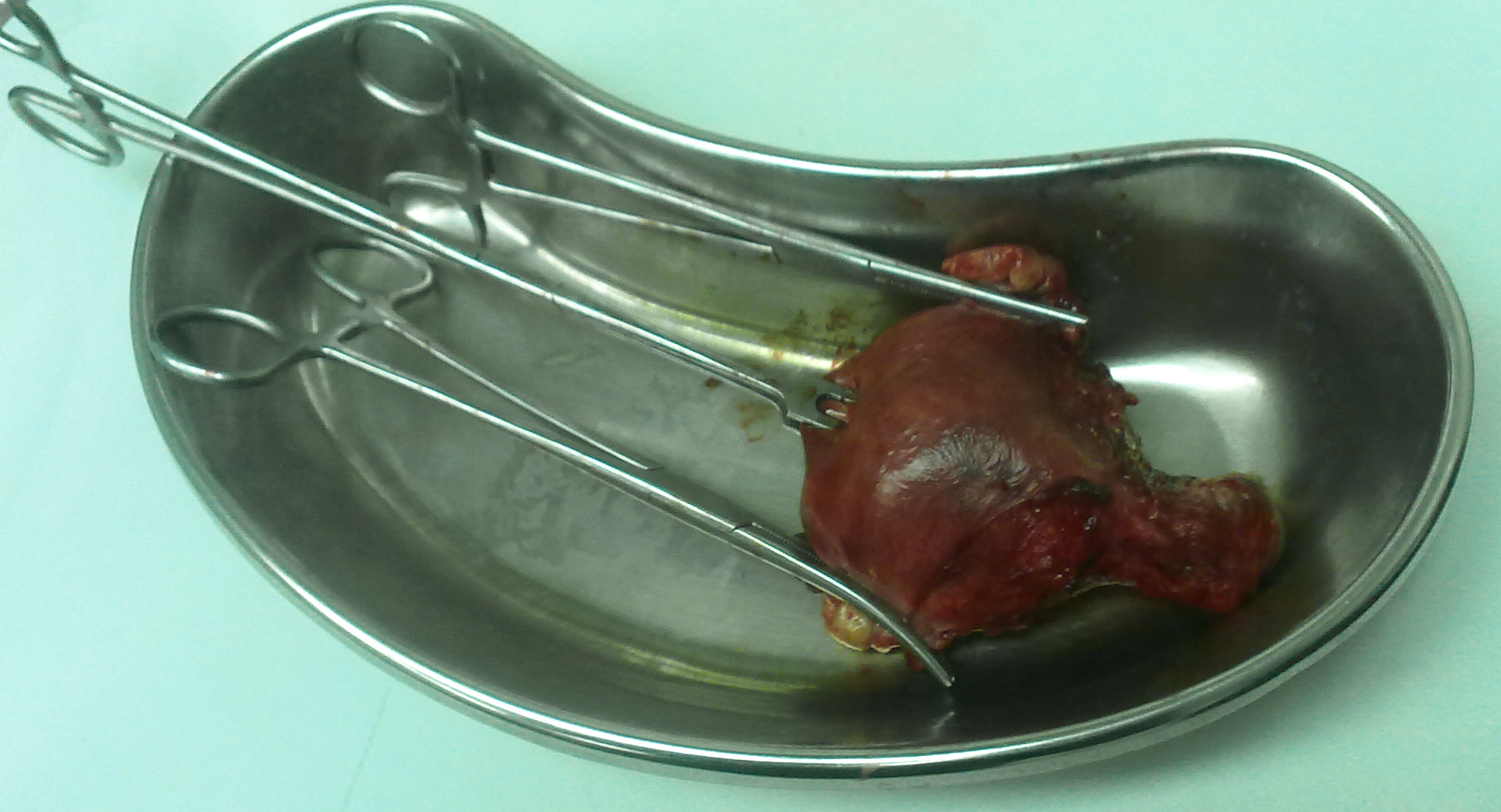 رحم برداشته شده در بعد از عمل هیسترکتومی. لوله های فالوپ و تخمدانها با هنی و فوندوس رحم با تناکولوم 4 شاخ نگه داشته شده اند